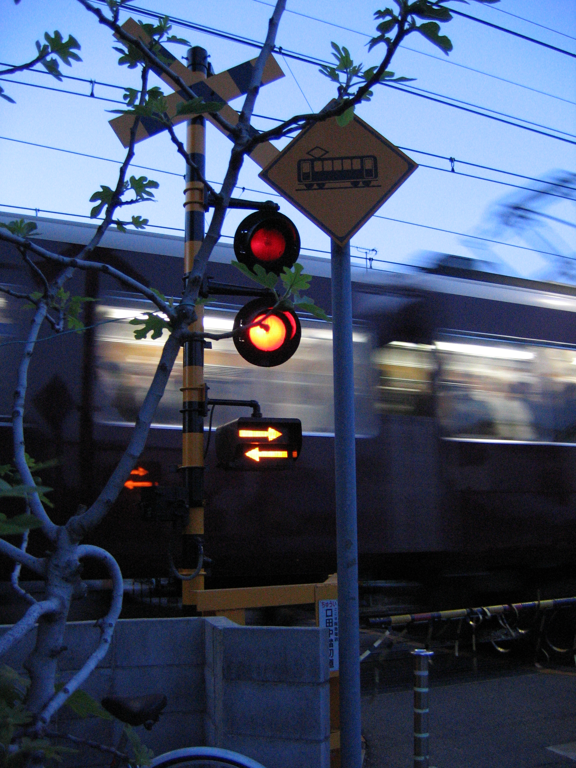 Hankyu Train passing a railroad crossing at Amagasaki